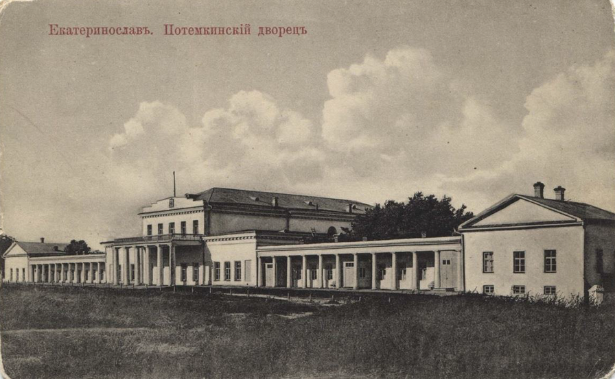 Потёмкинский дворец в Екатеринославе.